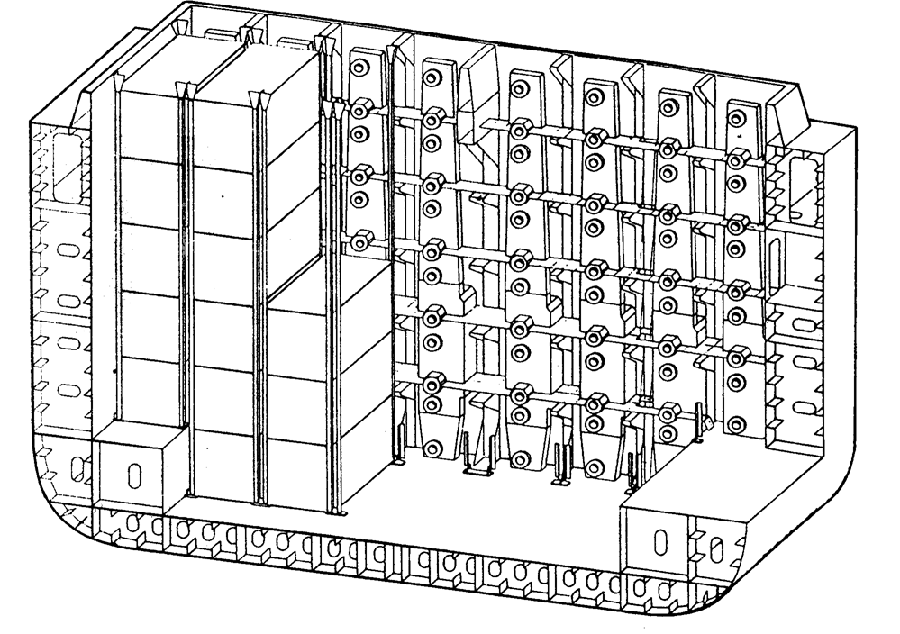 Senkrechter Kühlstab